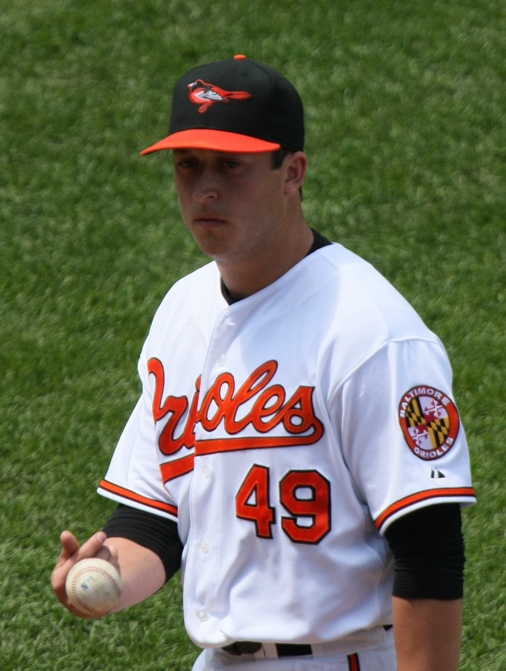 Jason Berken